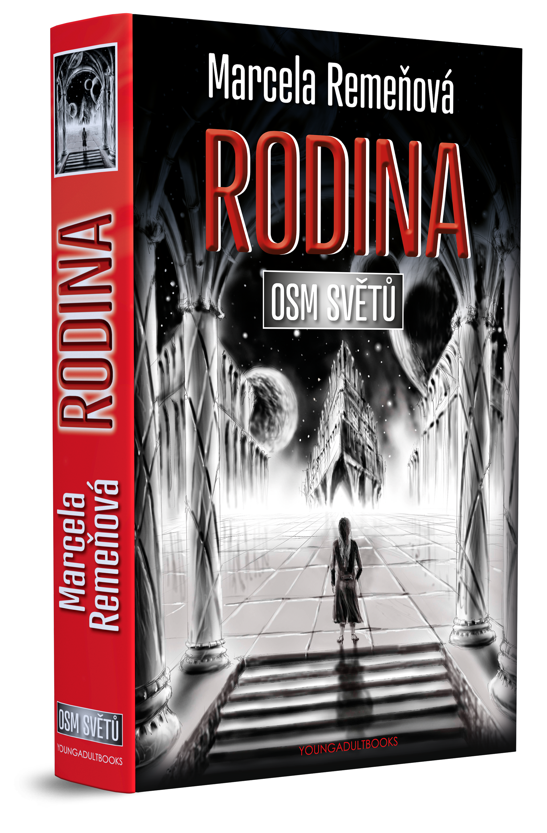 Osm světů Rodina - obal 3.díl